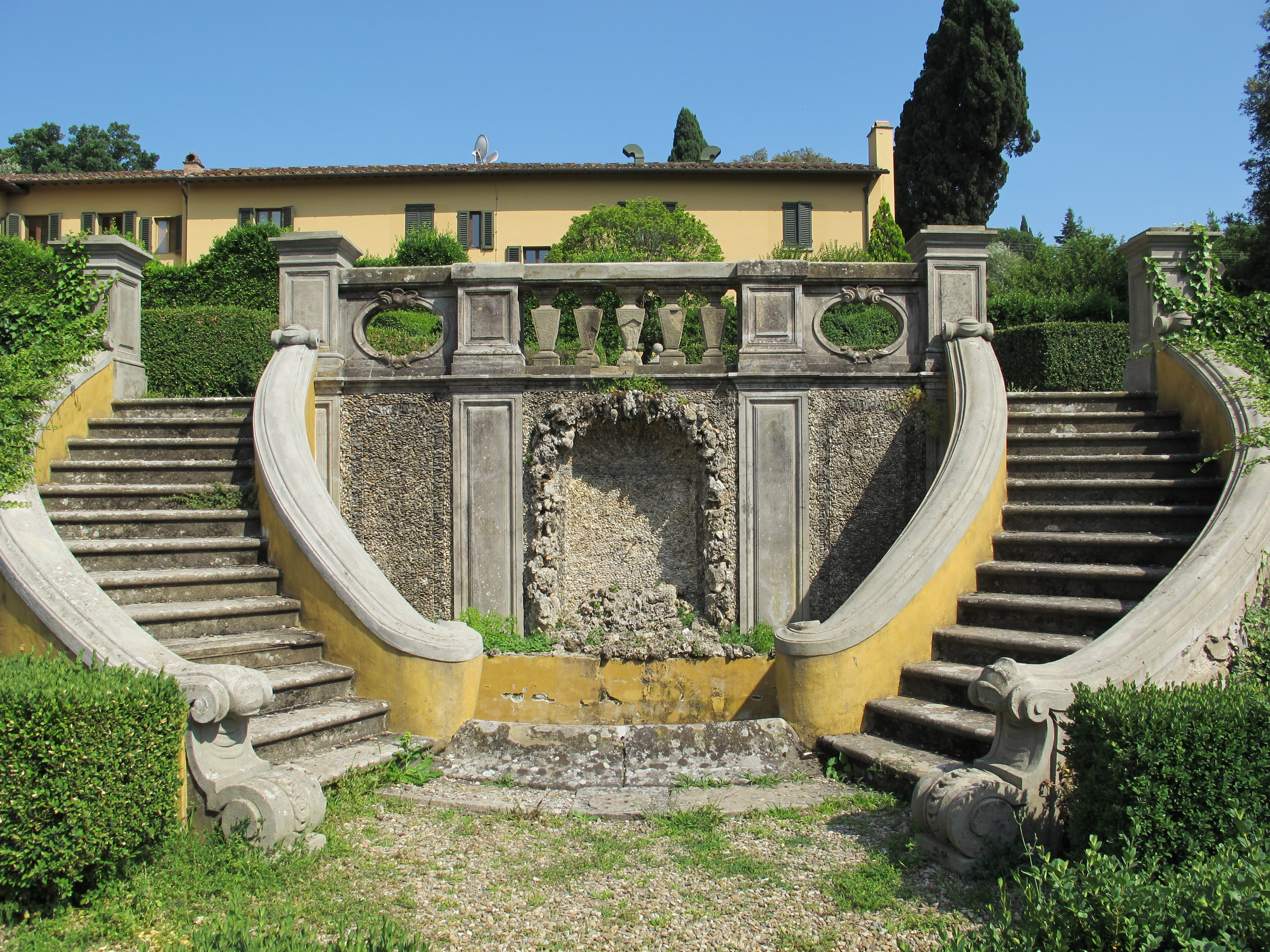 Villa schifanoia, giardino, seconda terrazza inferiore